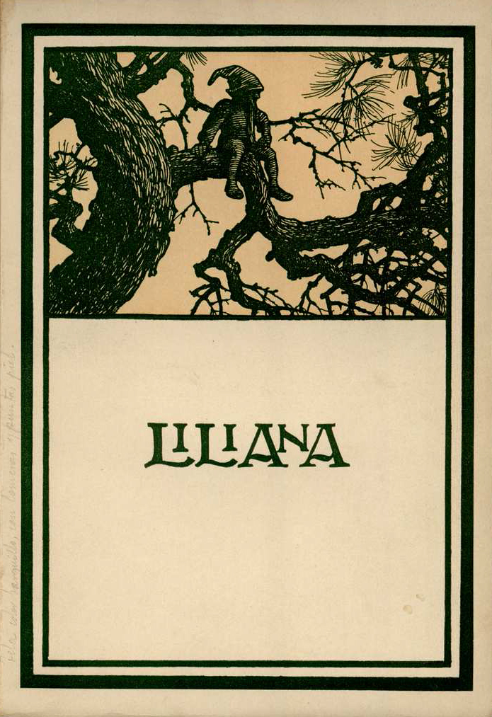 Portada de Liliana.